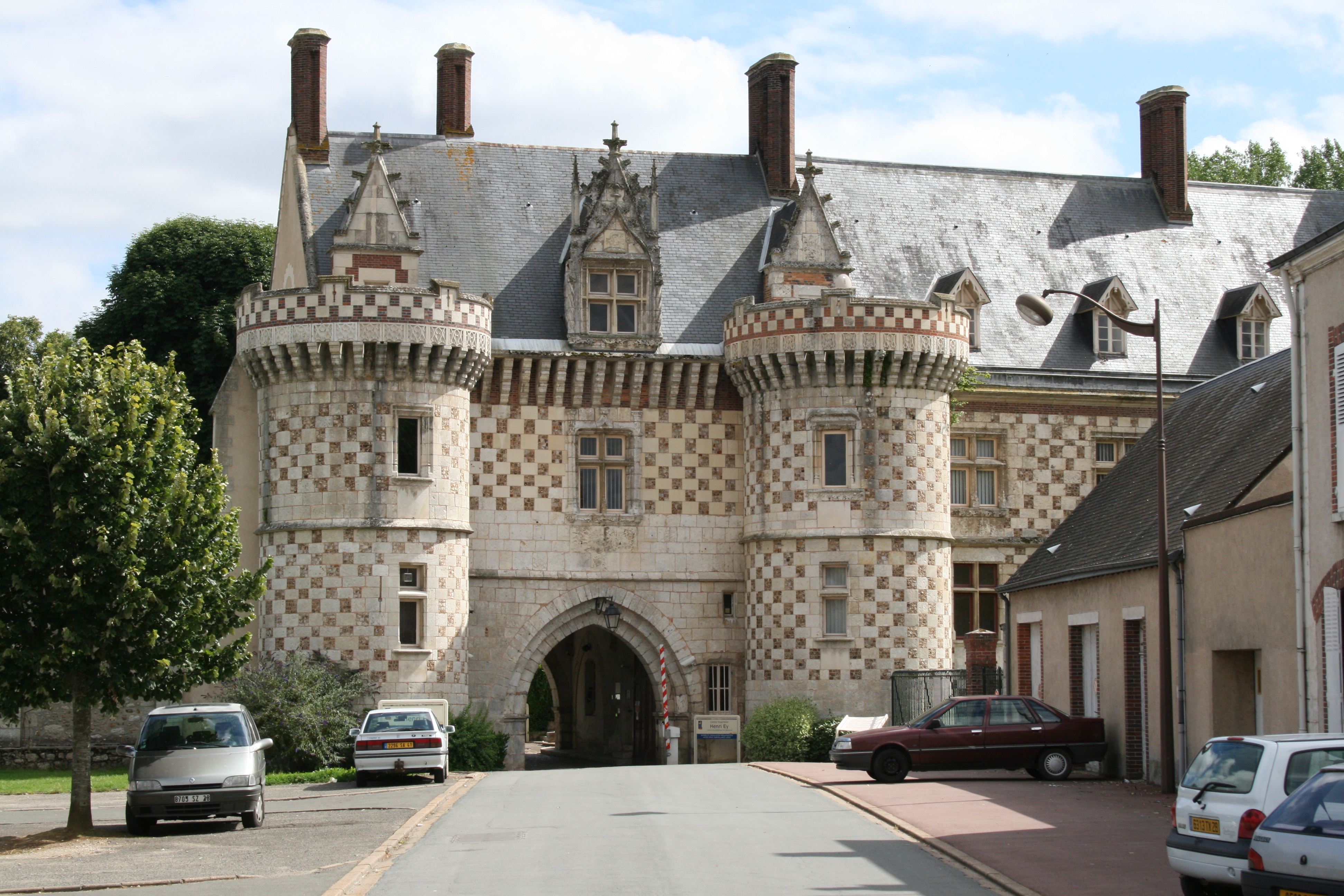 abbaye Saint-Florentin, Bonneval, Eure-et-Loir (France).